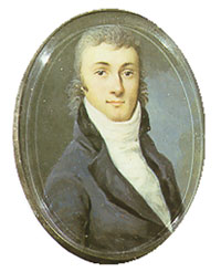 Karamzin